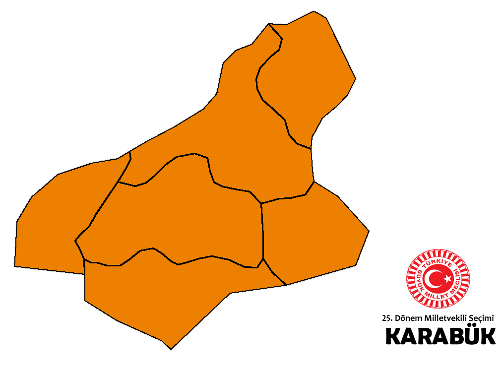 2015 genel seçim sonuçları